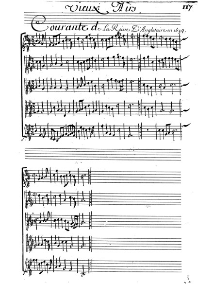 fotografia del manoscrit d'una courante del segle XVI de Charles de Lespine